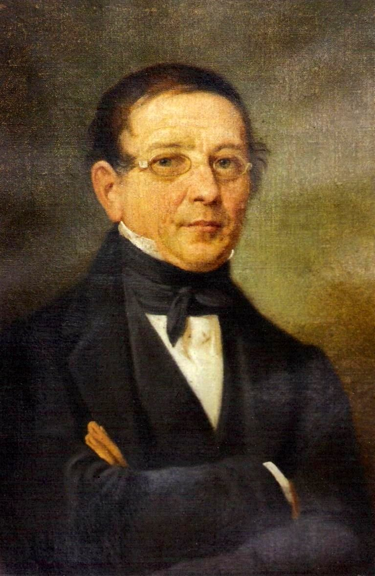 Oberst und Ständerat Josef Schumacher im Uttenberg, 1793-1860 (Gemälde in Privatbesitz)